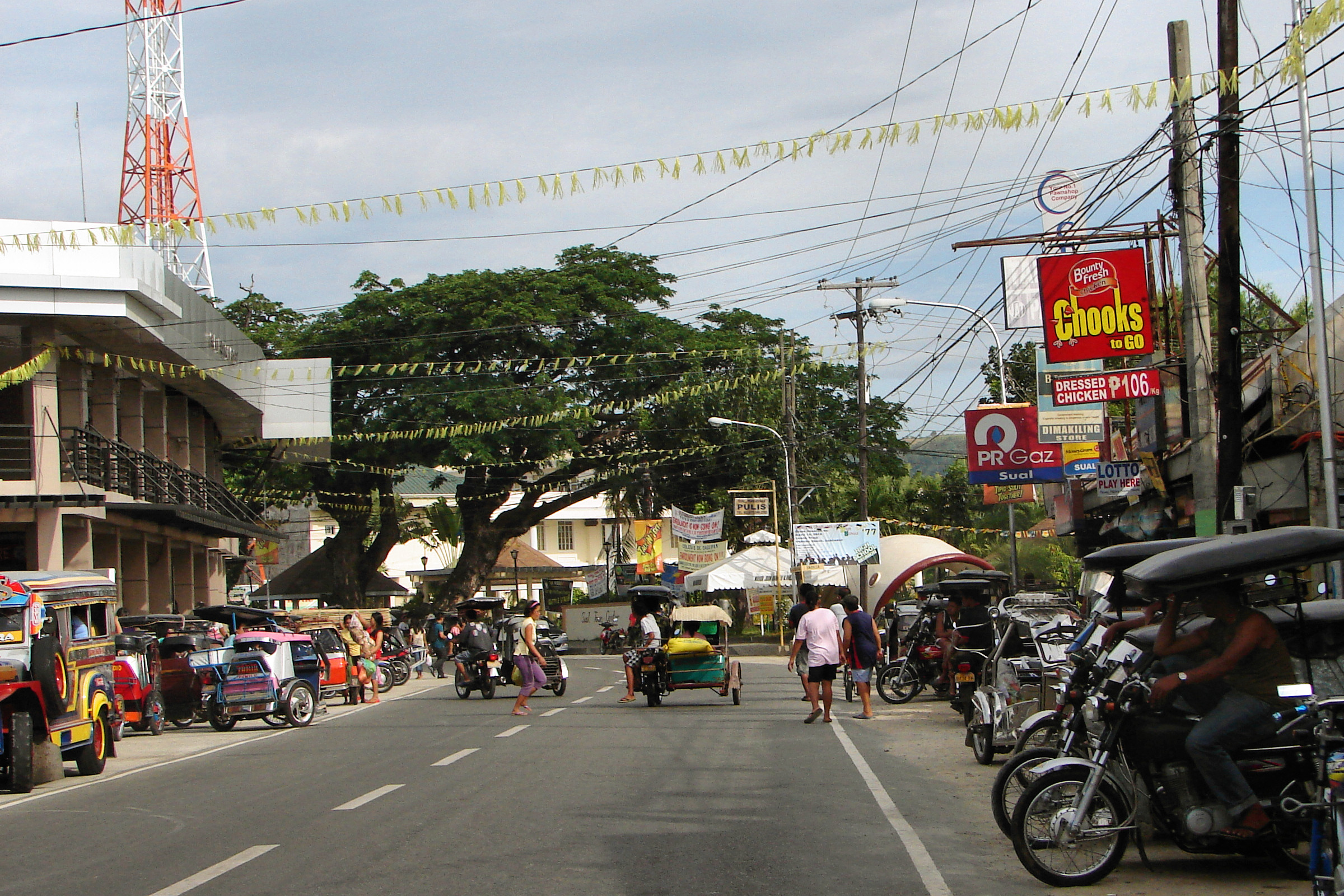 Sual, Pangasinan, Philippines